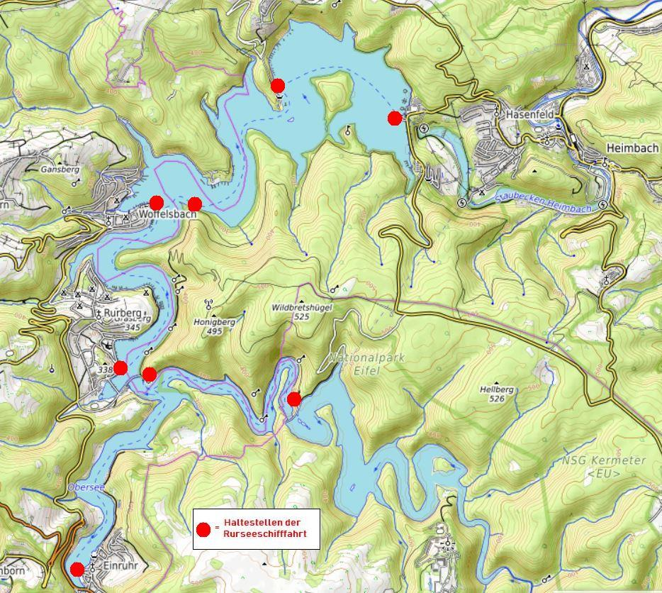 Fahrwege und Anleger der Reederei Rursee-Schifffahrt